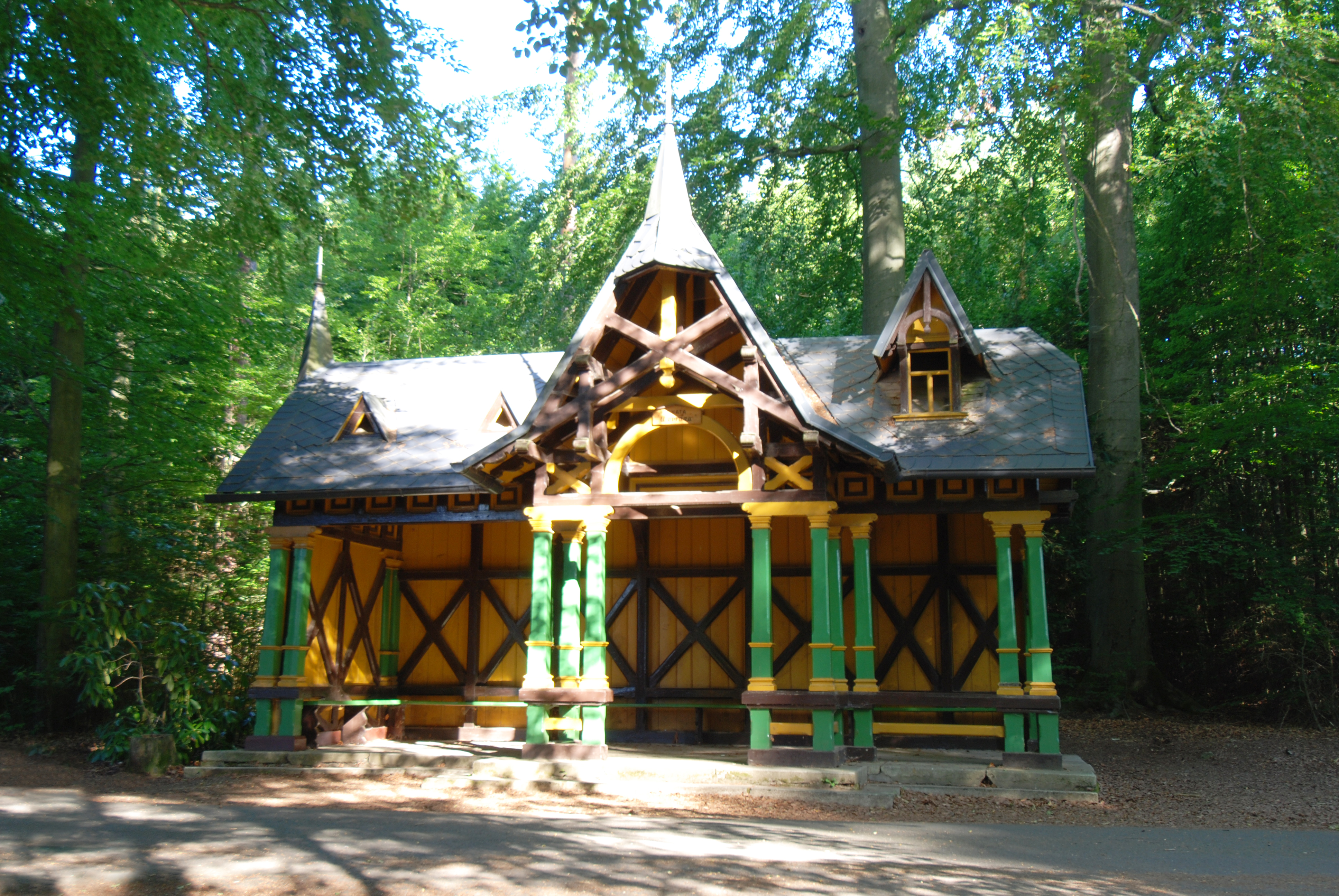 Altán U Obrazu u cesty Přátelství v karlovarských lázeňských lesích